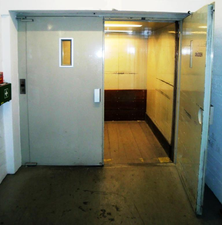 Tür eines Lastenaufzugs